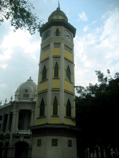 Torre Morisca, en el Malecon 2000.